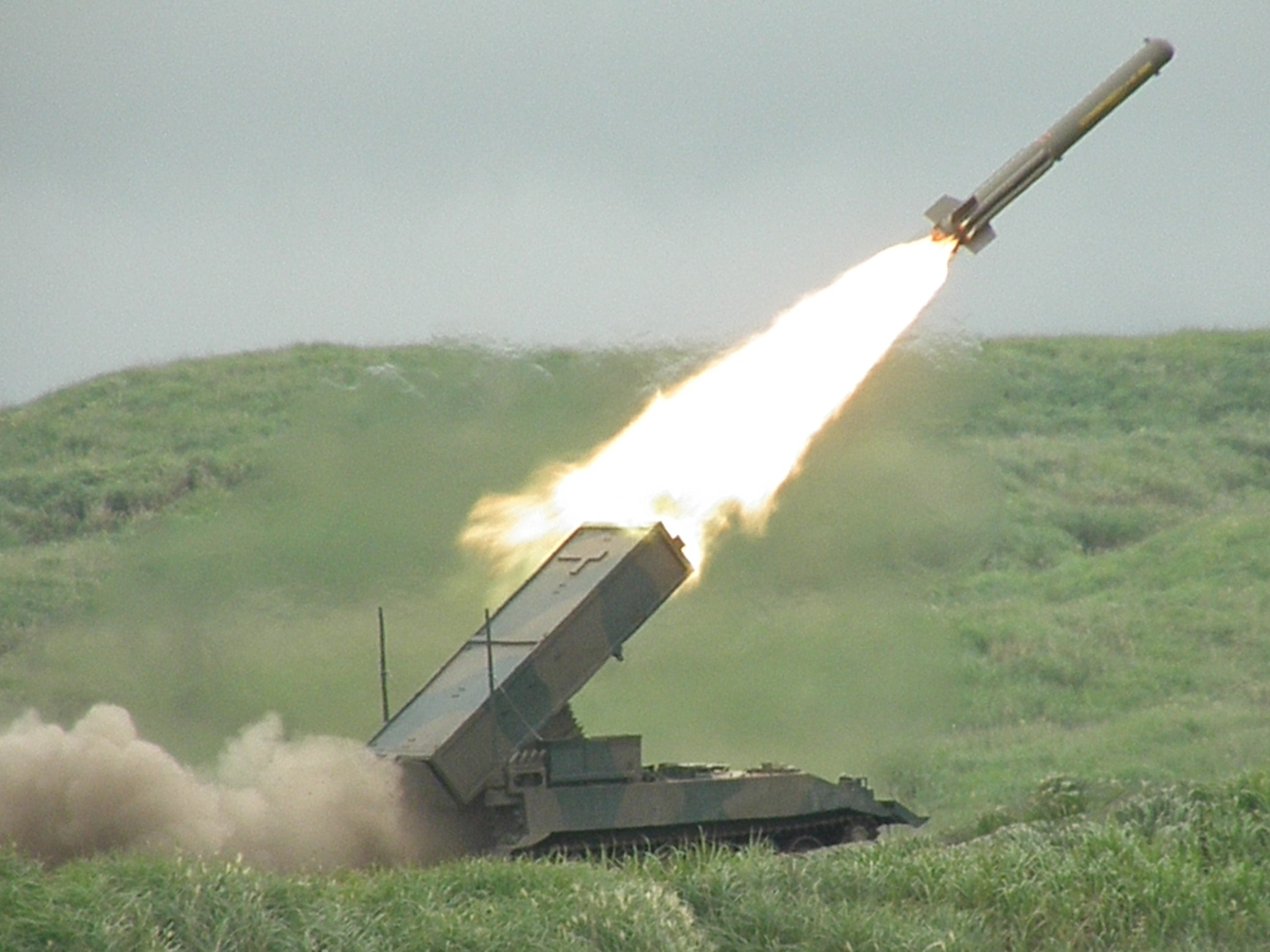 92式地雷原処理車、弾体投射